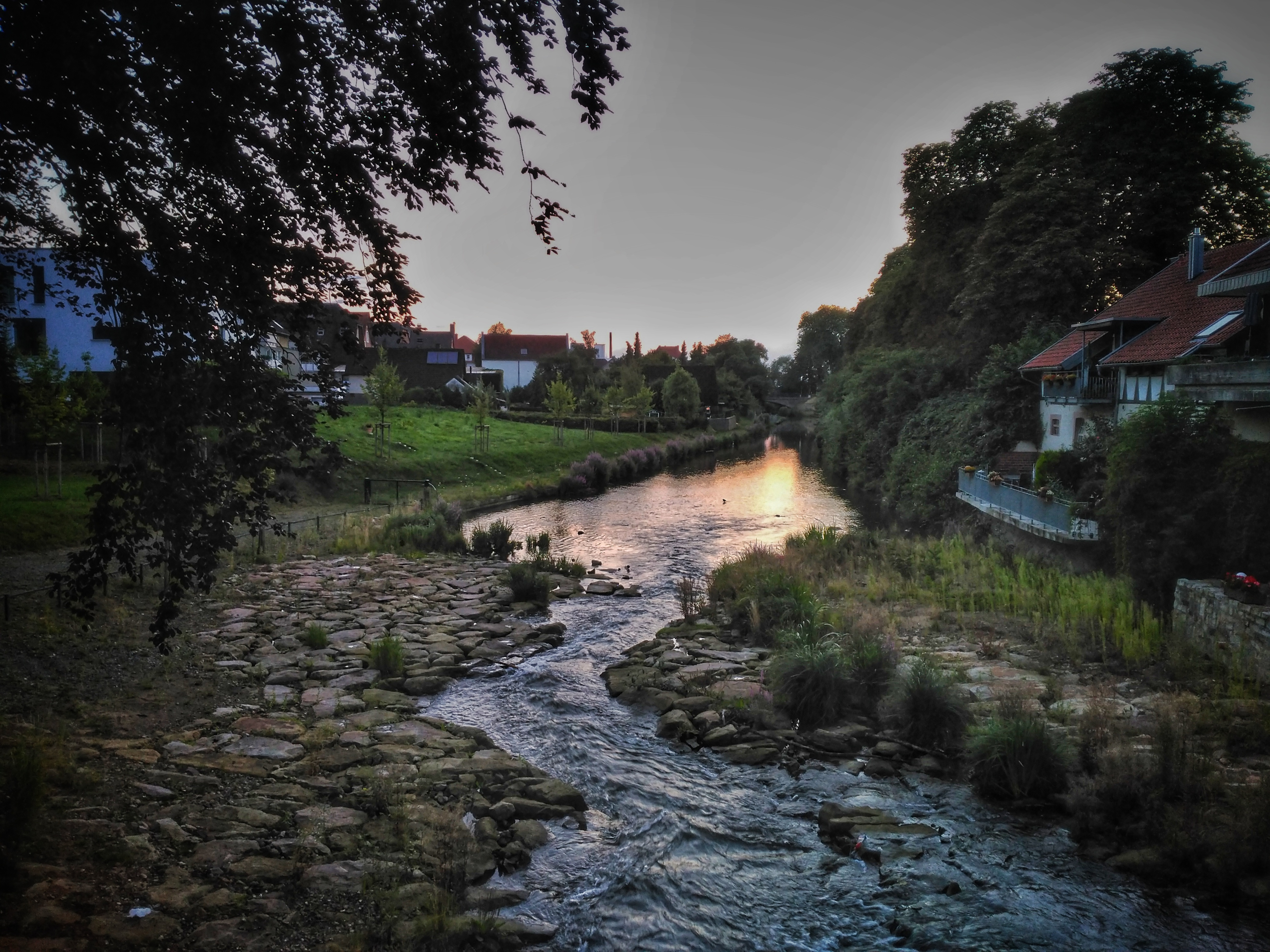 Bega river at Lemgo